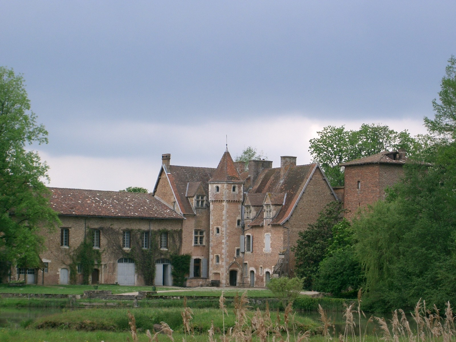 château de Saint-Paul-de-Varax dans la Dombes (département de l'Ain - France) : château du XIVe siècle remanié en résidence privée